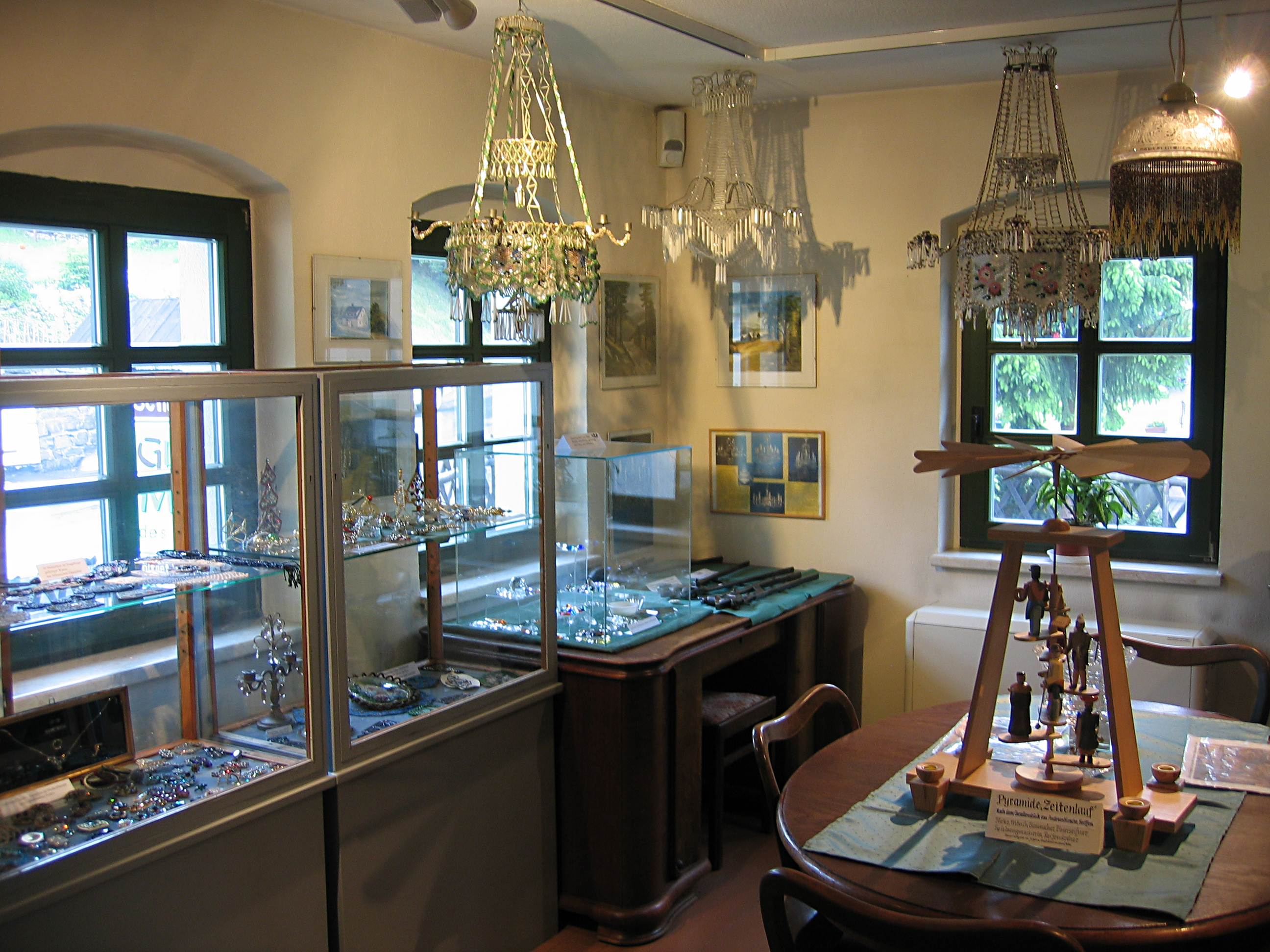 Glashüttenmuseum des Erzgebirges Neuhausen/Erzgeb.